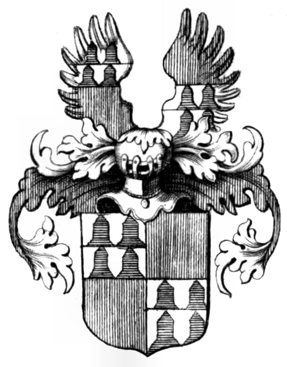 Wappen des Adelsgeschlechts von Cronberg, Flügelstamm (aus Humbracht, 1707: Wappentafel 12)